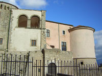 Vista laterale del Castello Pandone di Venafro. Autore Davide Di Meo